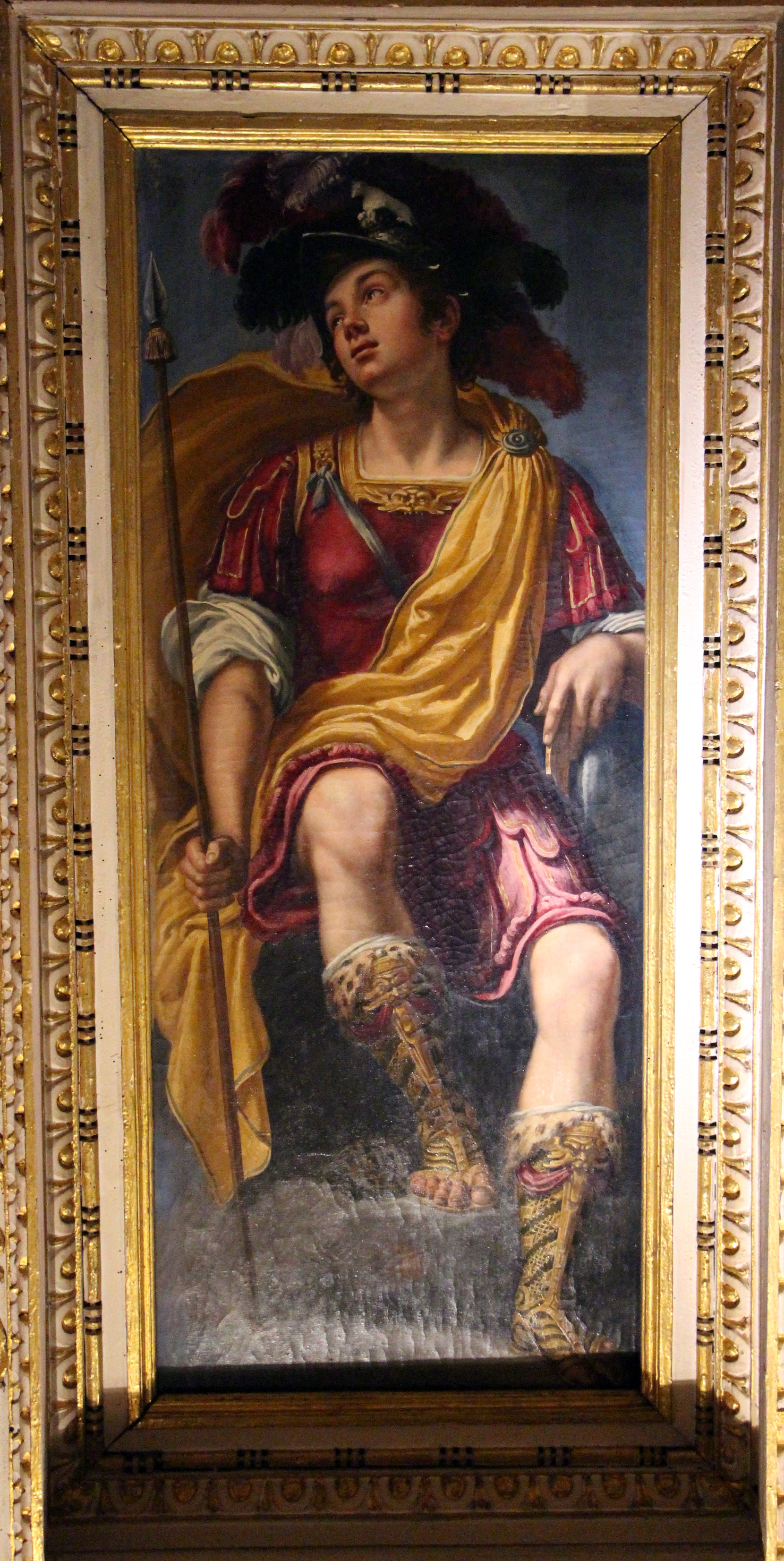 Casa Buonarroti - Galleria